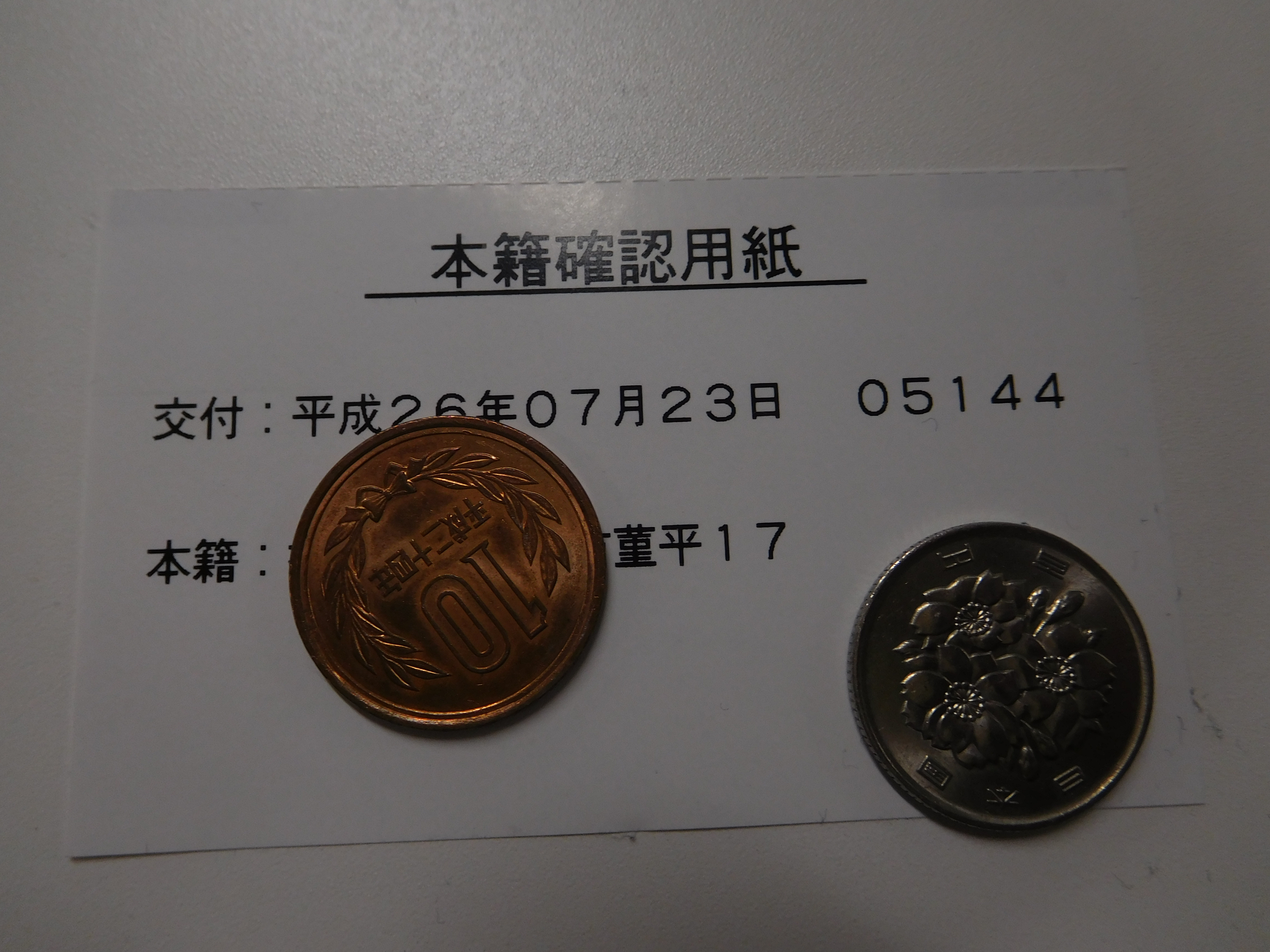 本籍確認用紙の例 東京都内で 厚手の紙タイプ